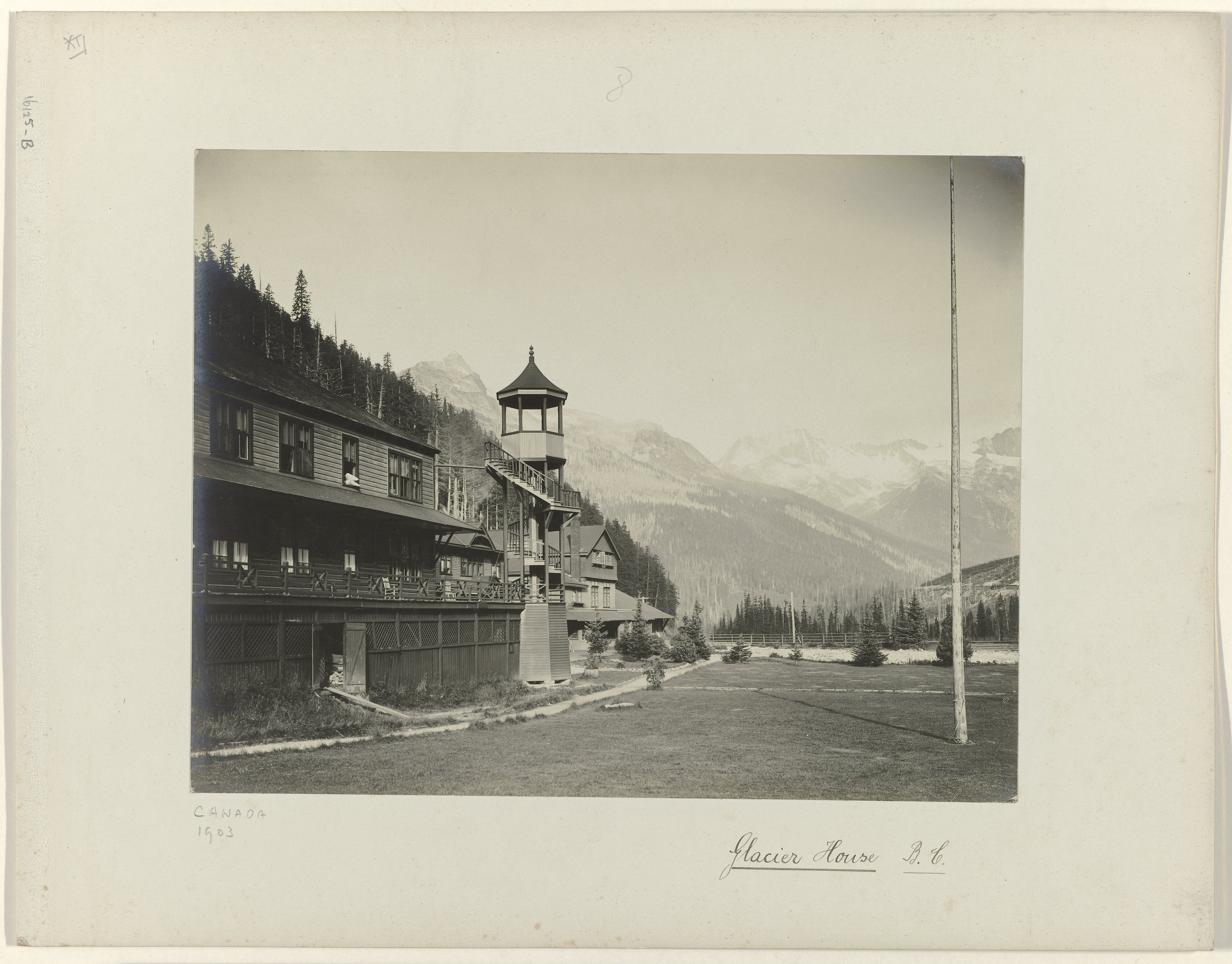 IdentificatieTitel(s): Glacier House langs de Canadian Pacific Railway in British ColumbiaGlacier House, B.C. (titel op object)Objecttype: foto Objectnummer: RP-F-F16125-BOpschriften / Merken: opschrift, recto onder, geschreven: ‘Canada 1903’VervaardigingVervaardiger: fotograaf: William Notman (toegeschreven aan)Plaats vervaardiging: MontréalDatering: 1893 - 1913Fysieke kenmerken: matte daglichtcollodiumzilverdrukMateriaal: papier karton Techniek: matte daglichtcollodiumzilverdrukAfmetingen: foto: h 178 mm × b 230 mmblad: h 257 mm × b 330 mmOnderwerpWat: mountainsWaar: Brits-ColumbiaVerwerving en rechtenVerwerving: overdracht van beheer 1994Copyright: Publiek domein